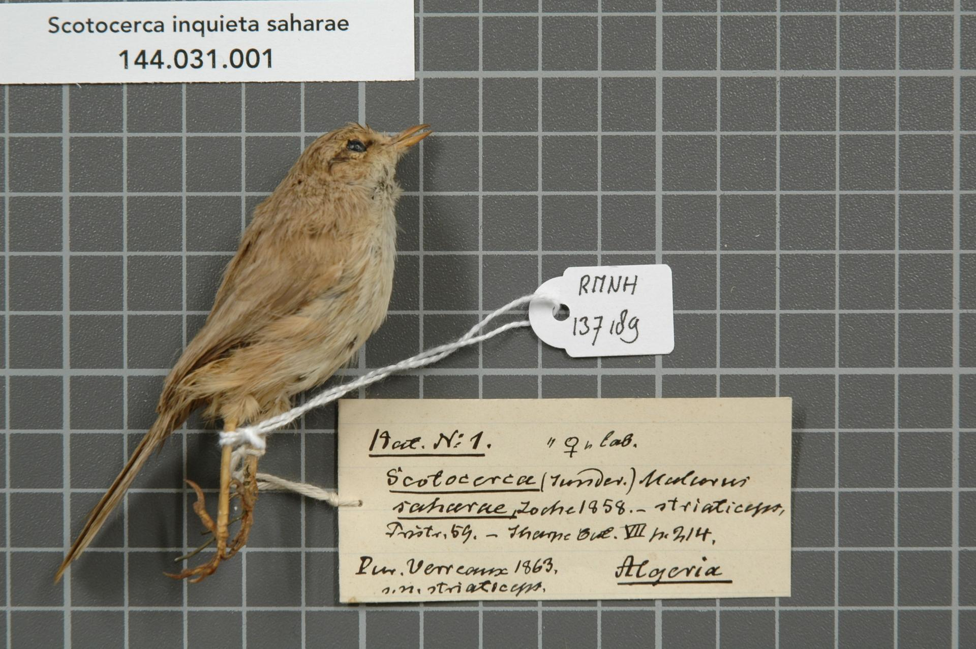 Scotocerca inquieta saharae (Loche, 1858)